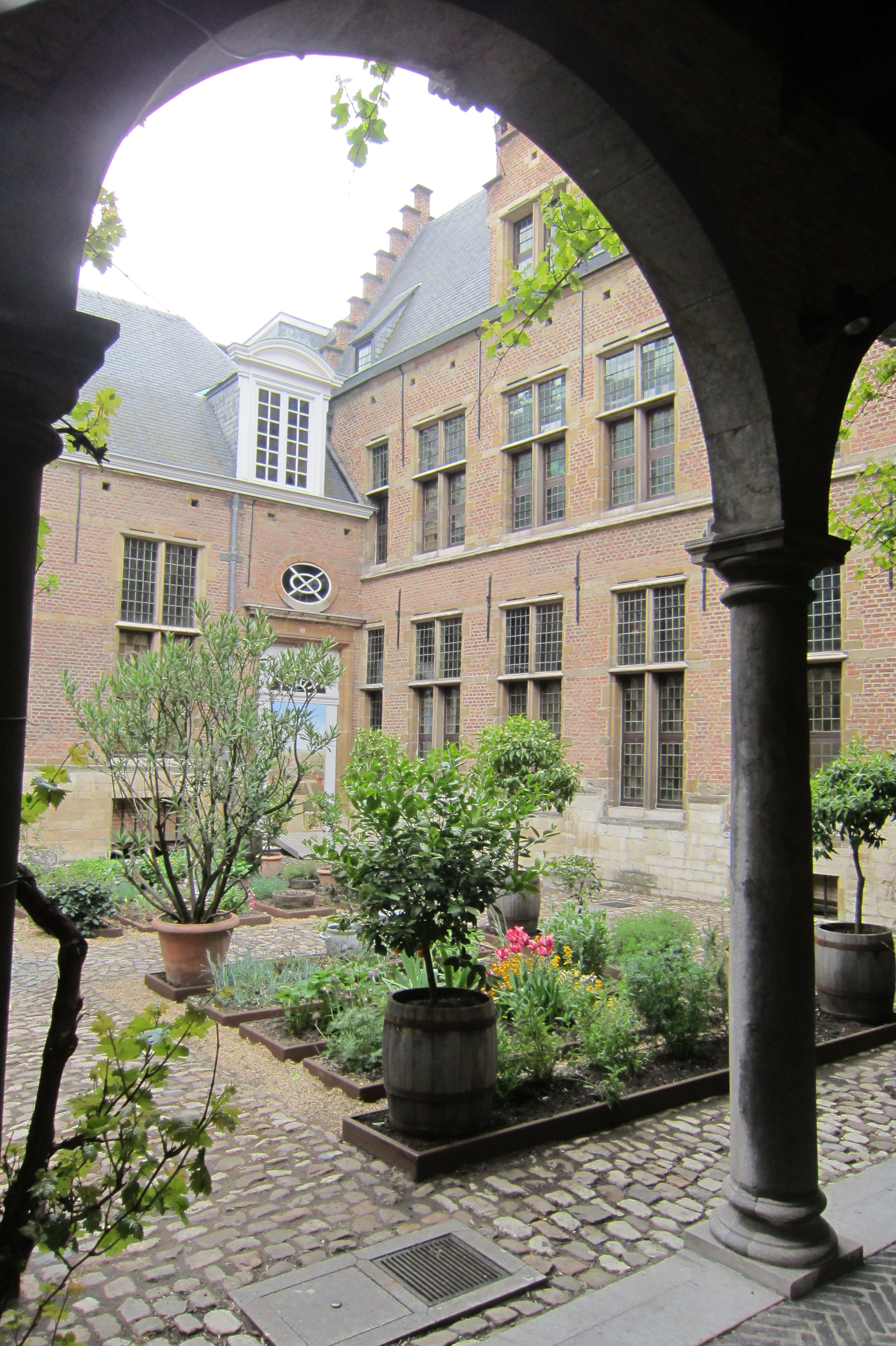 De binnentuin van het Rockoxhuis te Antwerpen